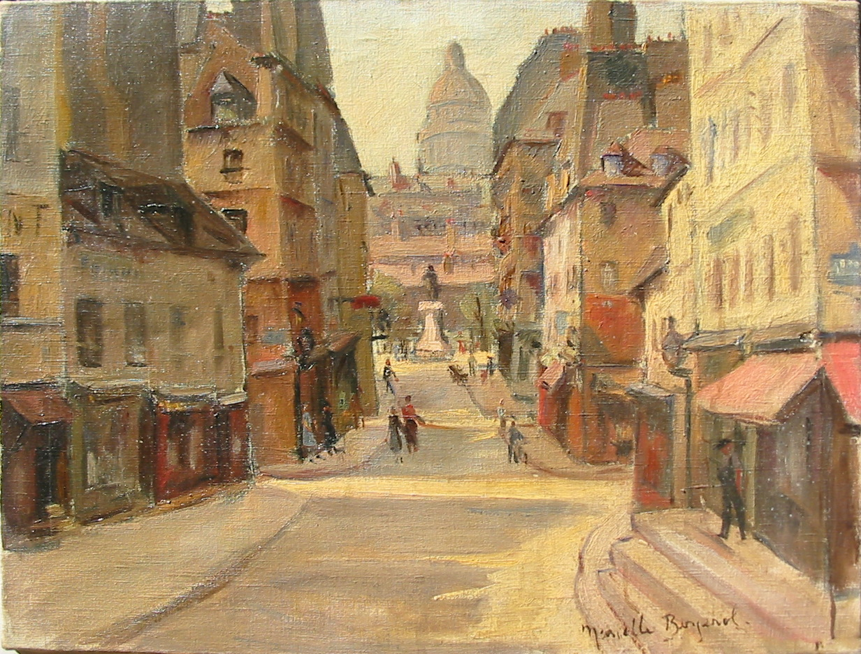 photo de toile